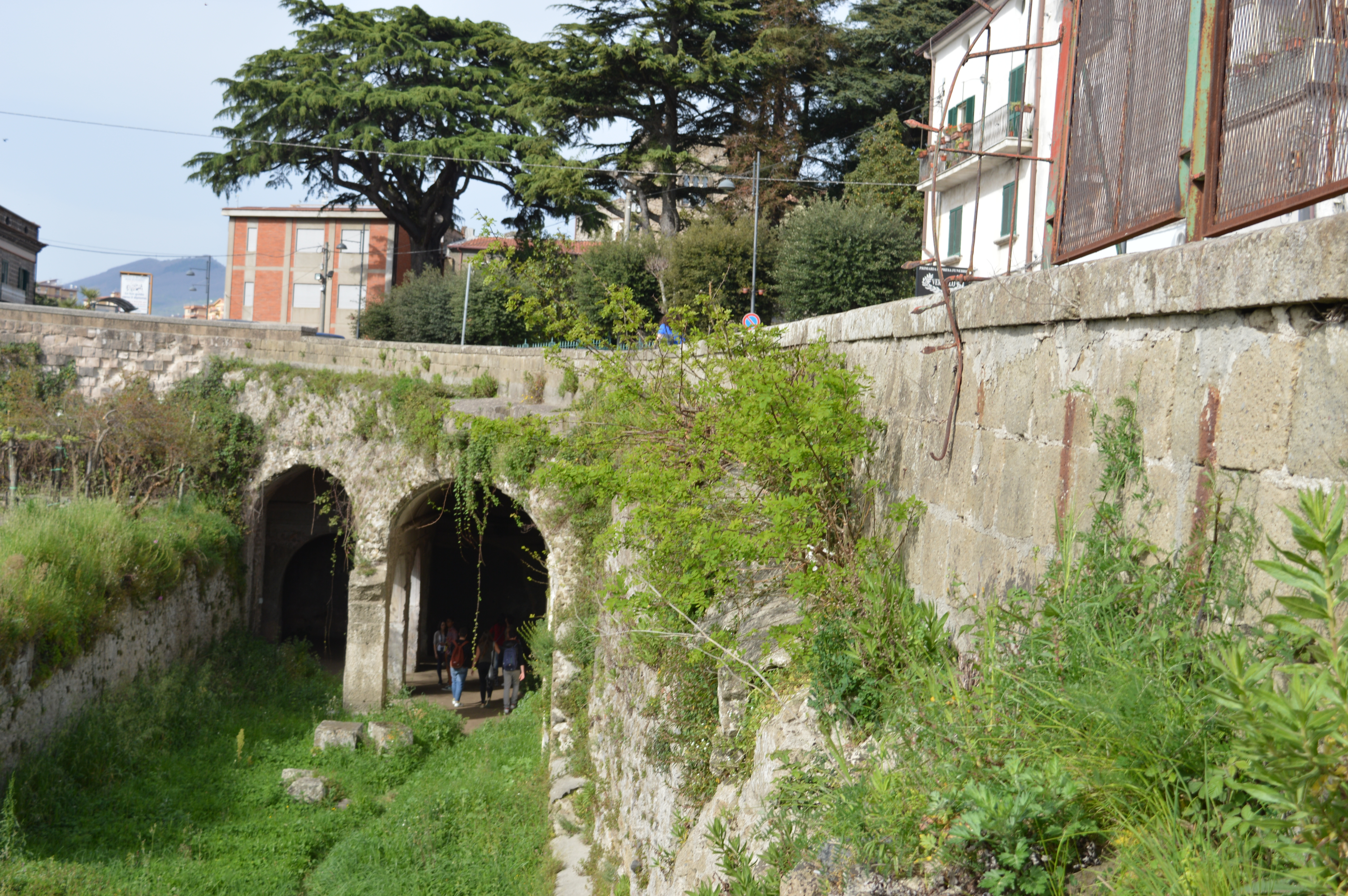 criptoportico